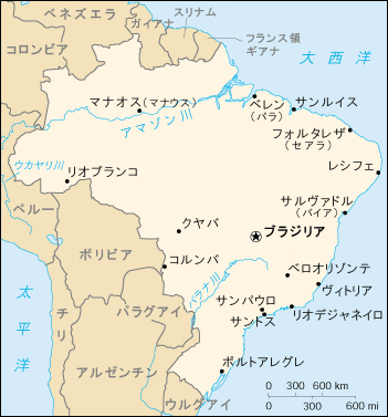 ブラジル地図（日本語版） PDの CIA The World Factbook のファイルを日本語化